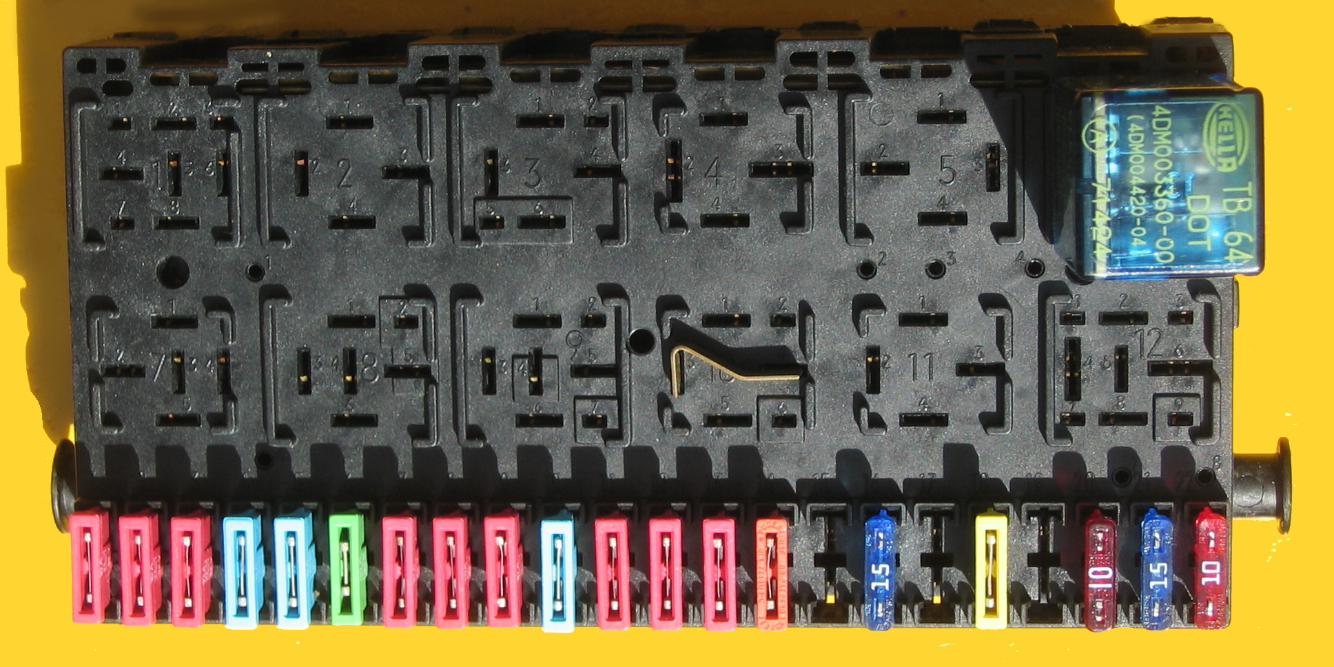 VW T4 Zentralelektrik Sicherungskasten